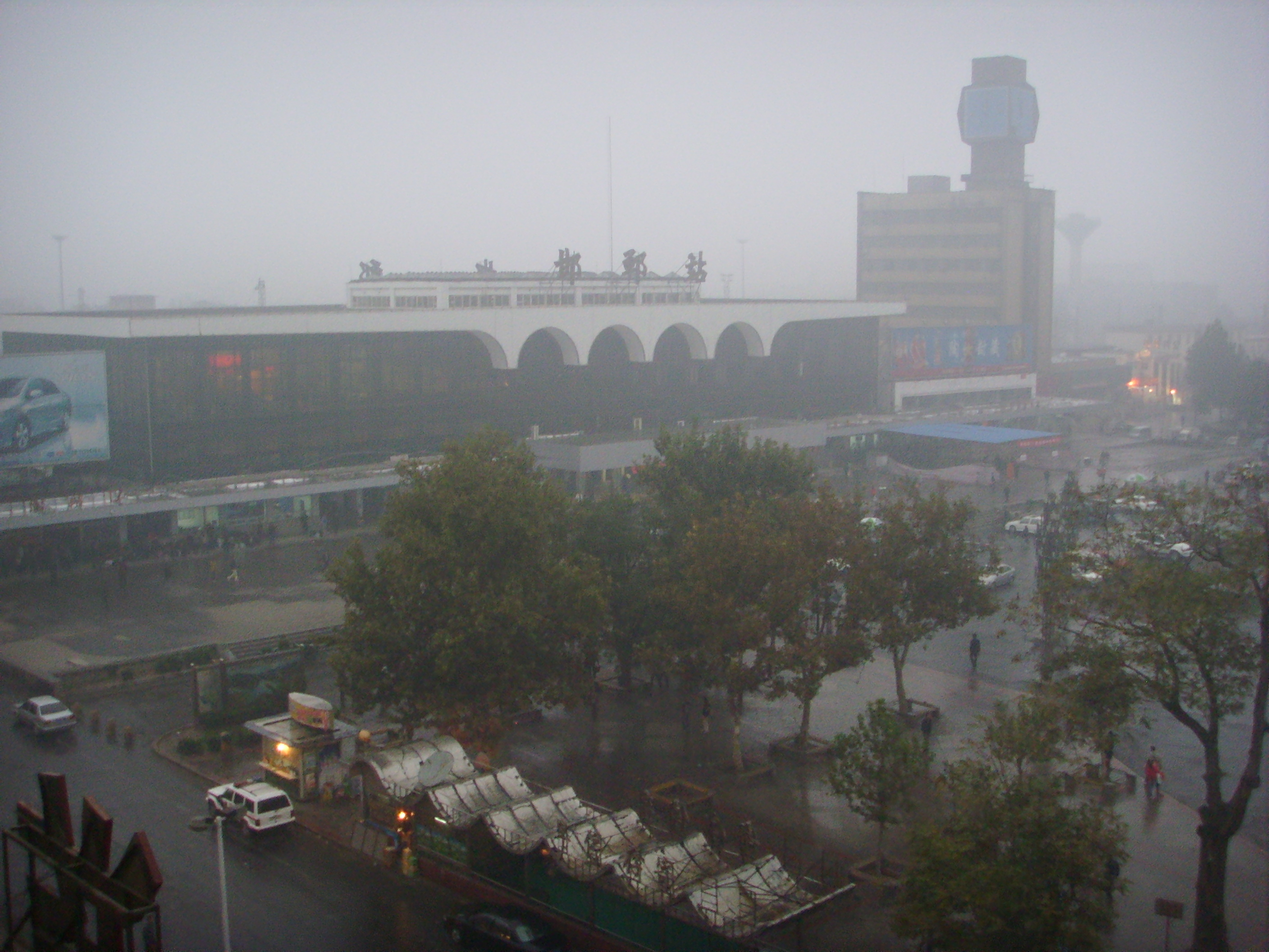 邯郸火车站